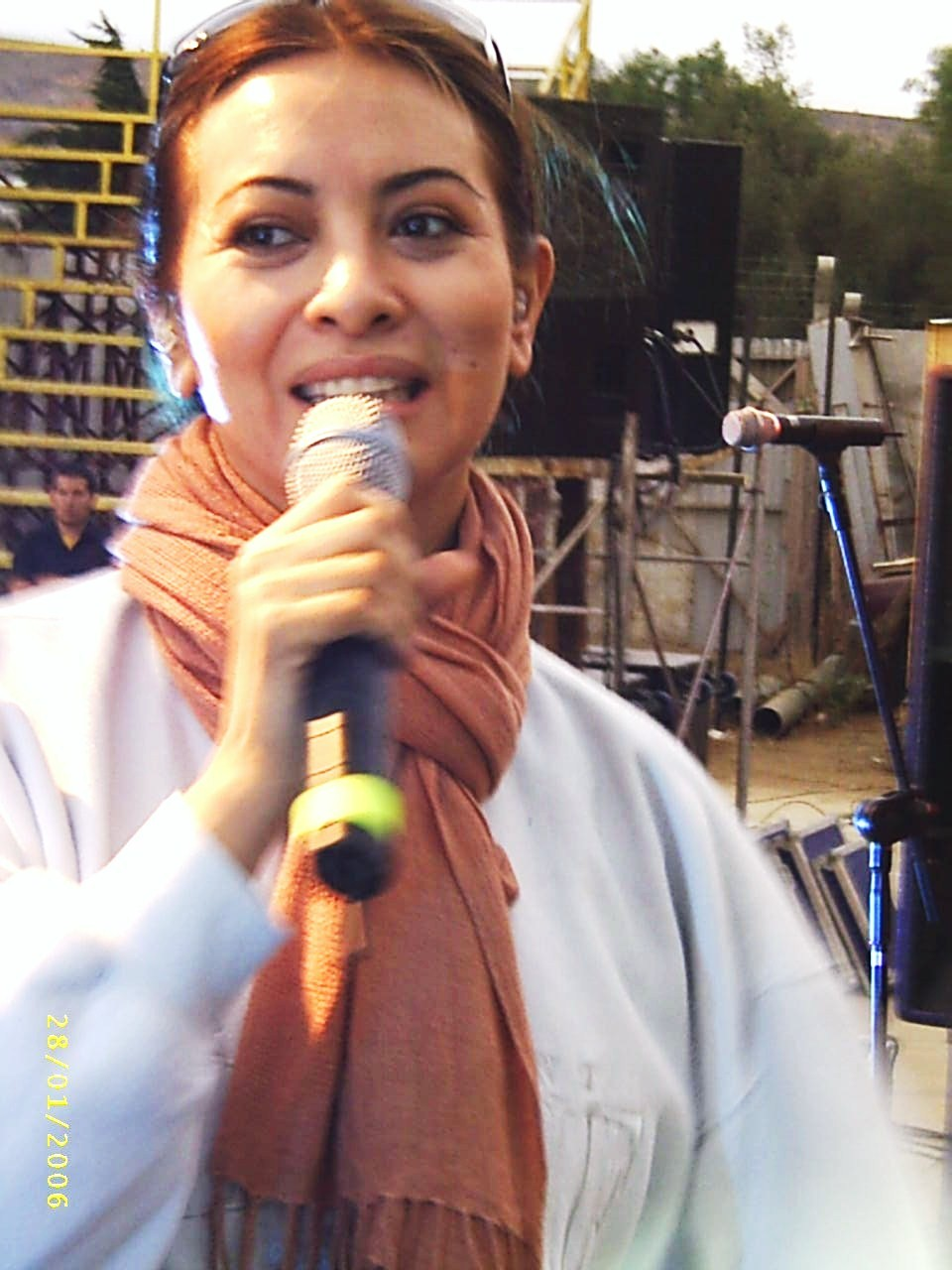 Myriam Hernandez en el Festival de la Canción canela canta en Verano